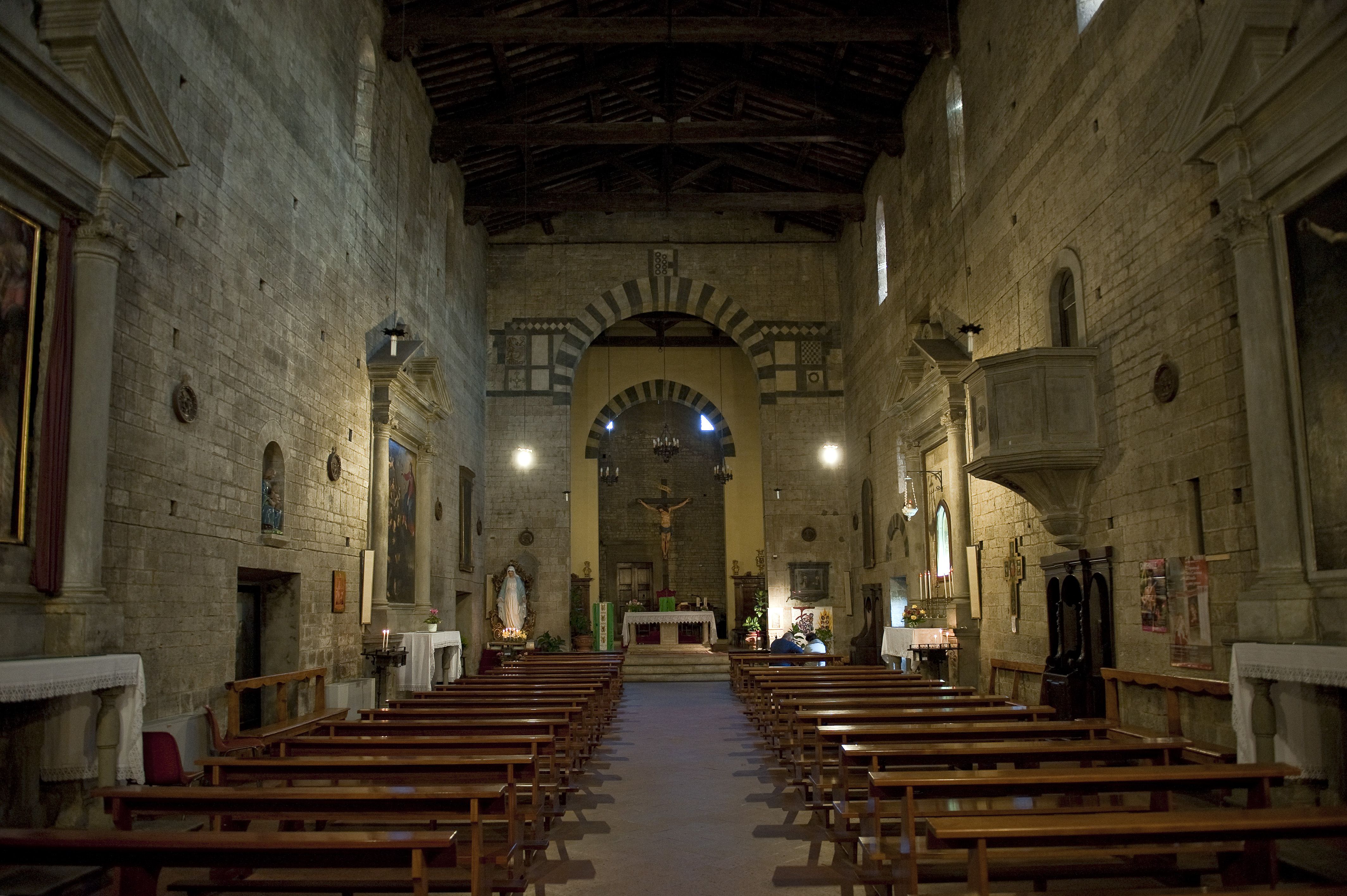 Interno della Pieve di Santa Maria ad Antella (Bagno a Ripoli)